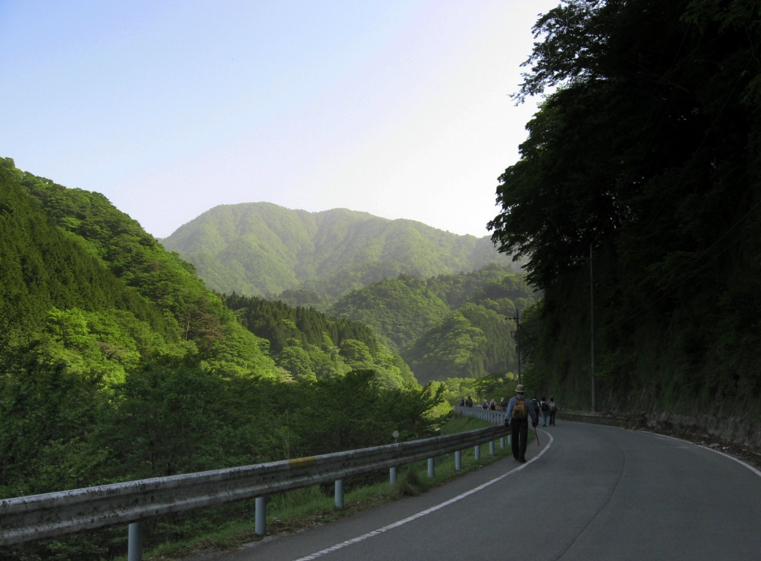 神奈川県道76号線から望む大室山